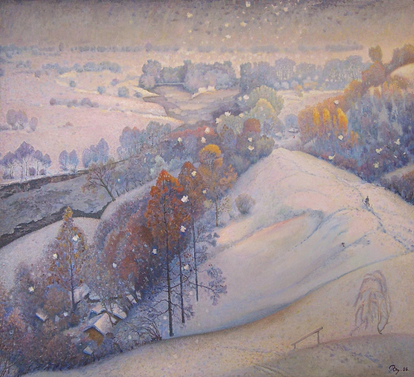 Зима в Седневі